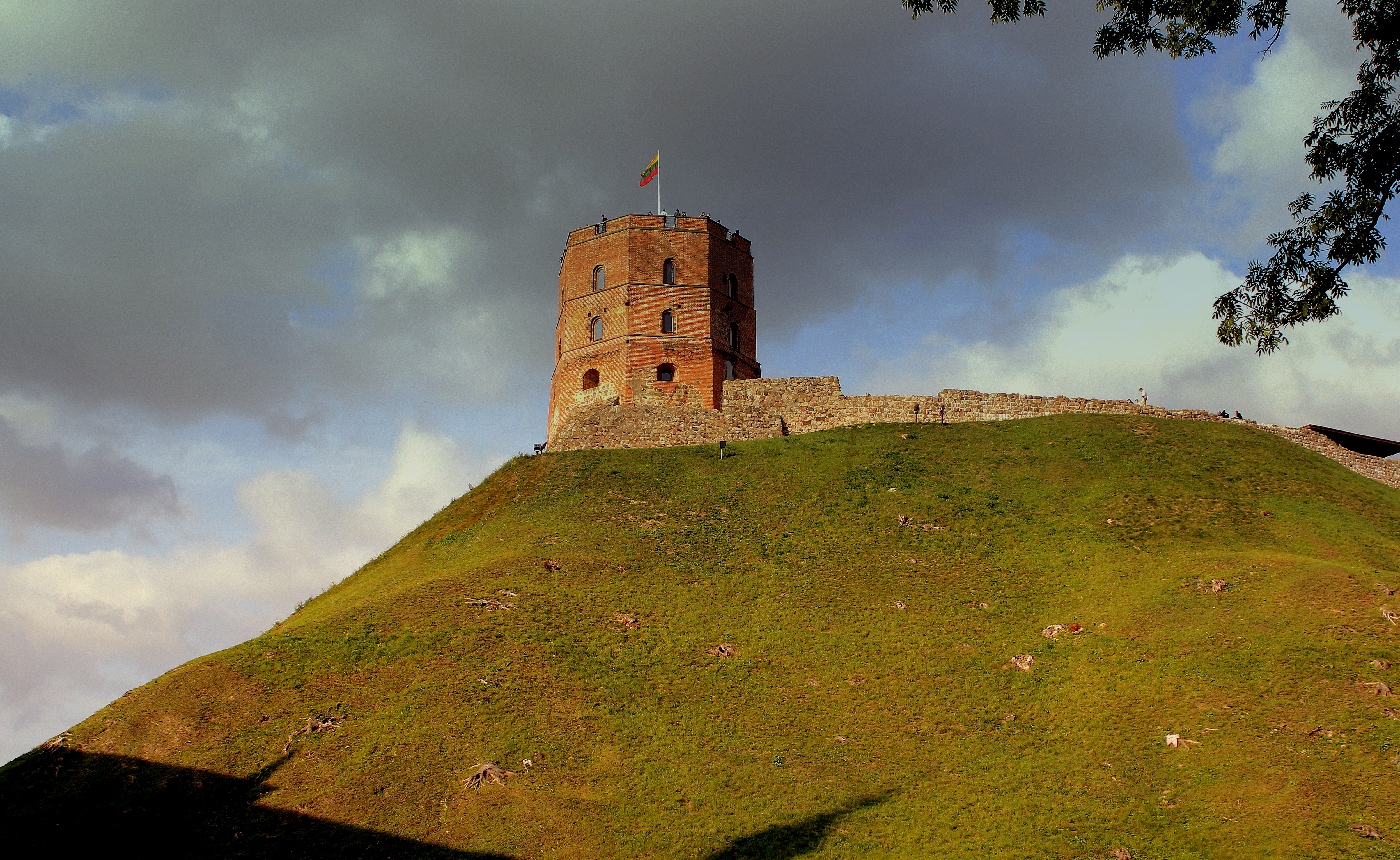 VILLINUS OLD TOWN LITHUANIA SEP 2013